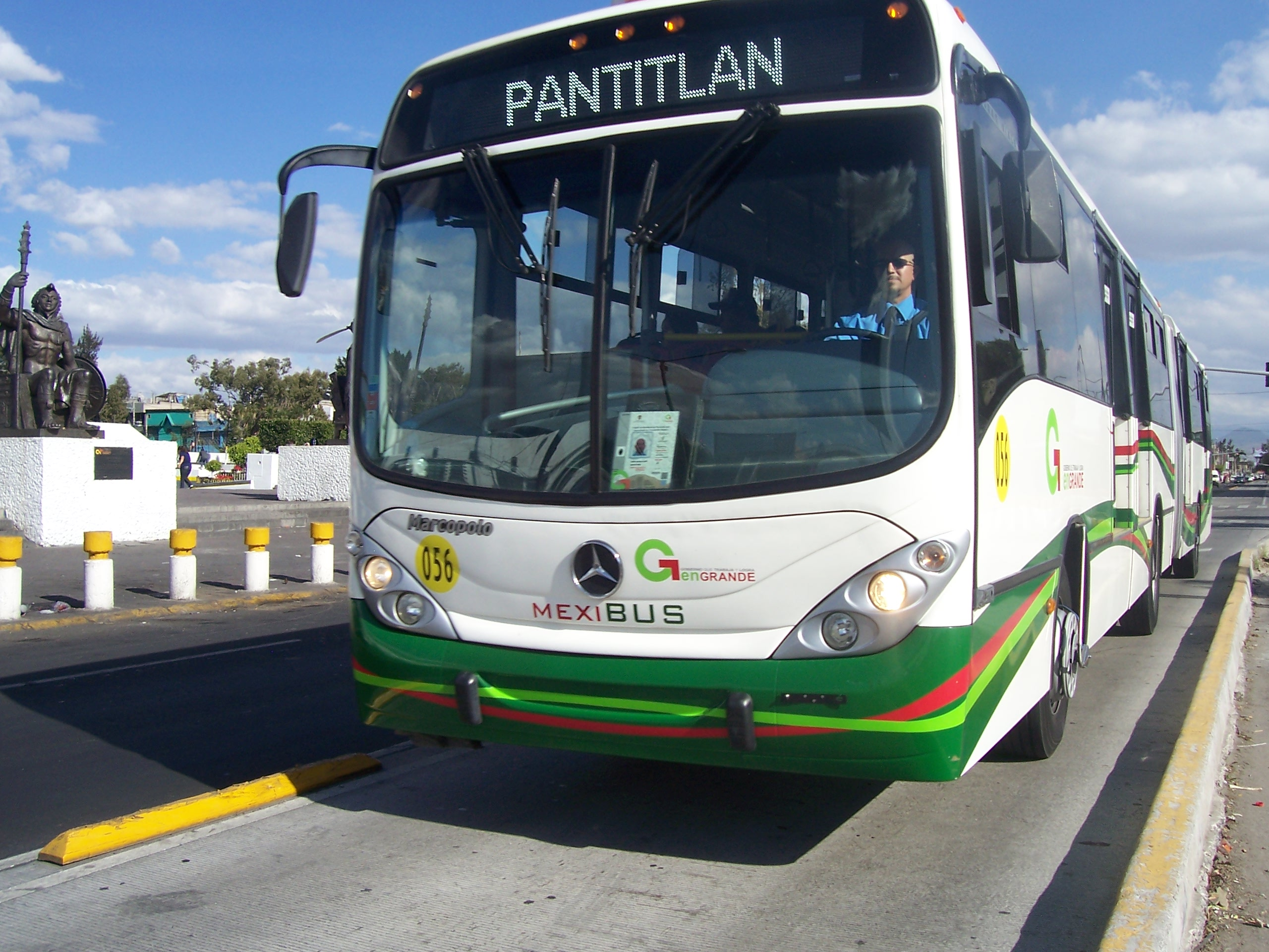 Toma de Mexibus con el Ayuntamiento a su costado